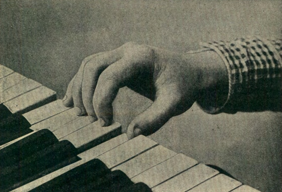 Hand- und Fingerstellung. A. Vorübung zum Legato.